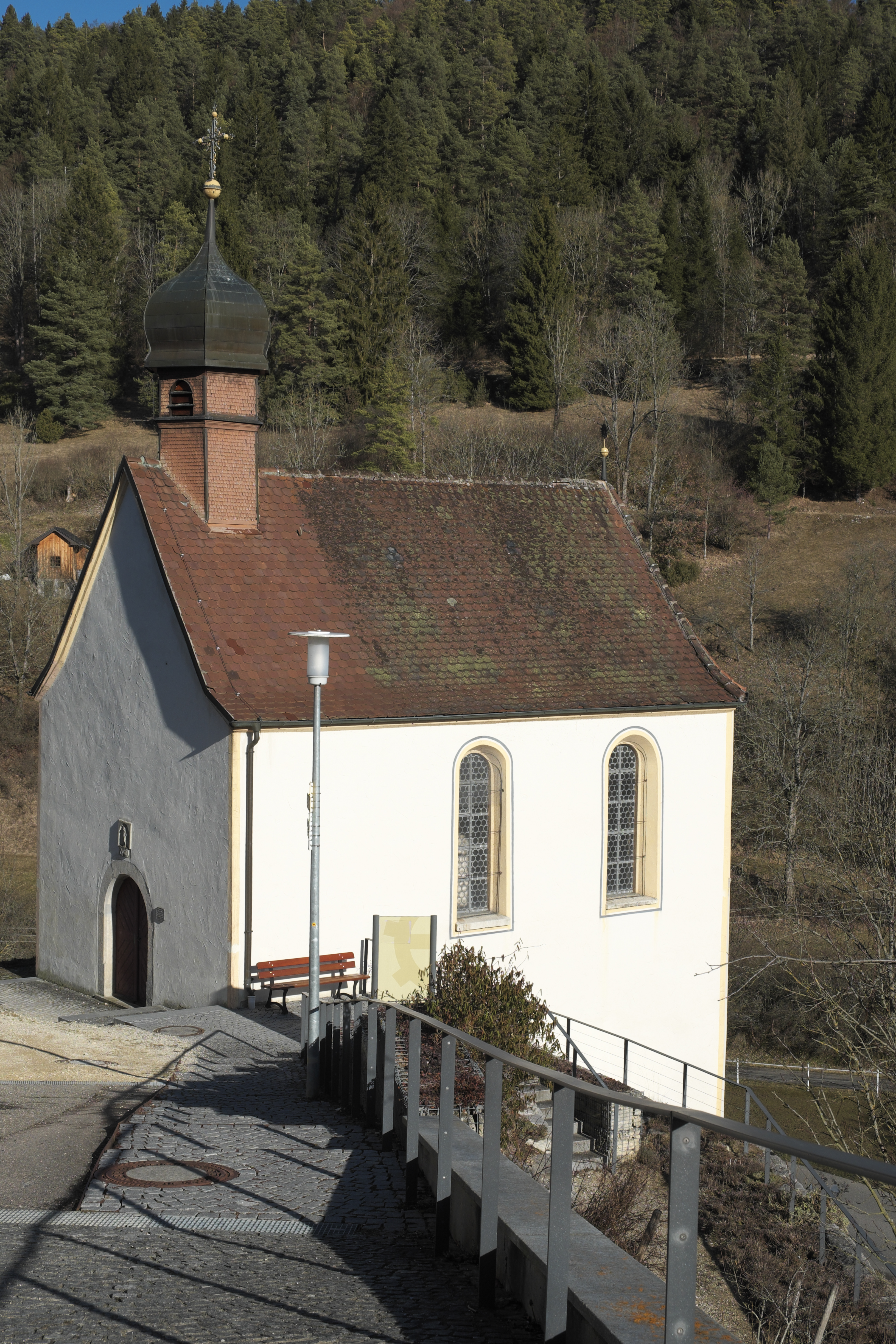 Sebastianskapelle in Mühlheim an der Donau im Landkreis Tuttlingen (Baden-Württemberg/Deutschland)